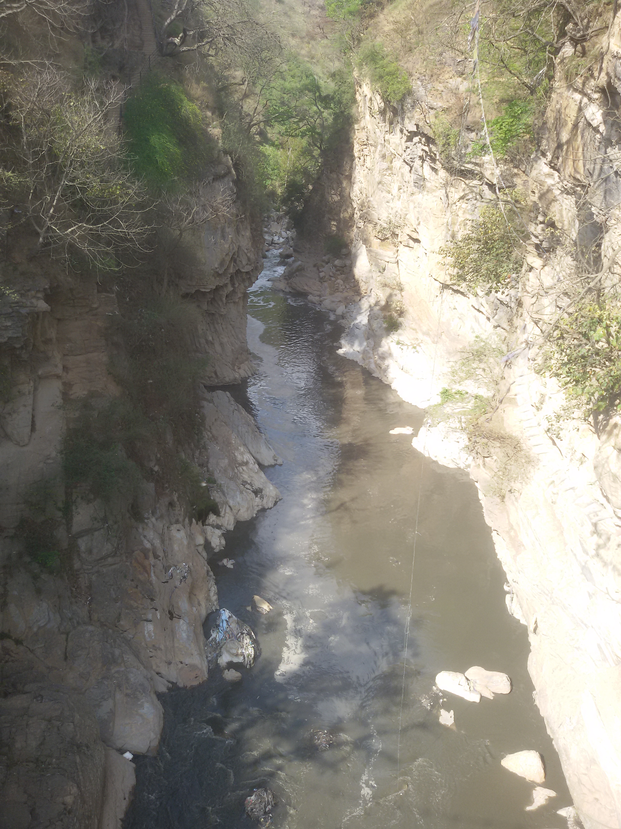 नेपाली: Kathman, Nepal